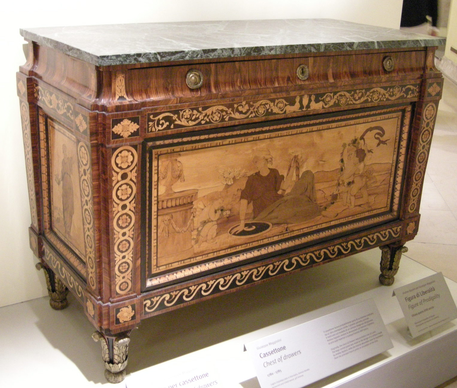 Giuseppe maggiolini, cassettone, 1780-85